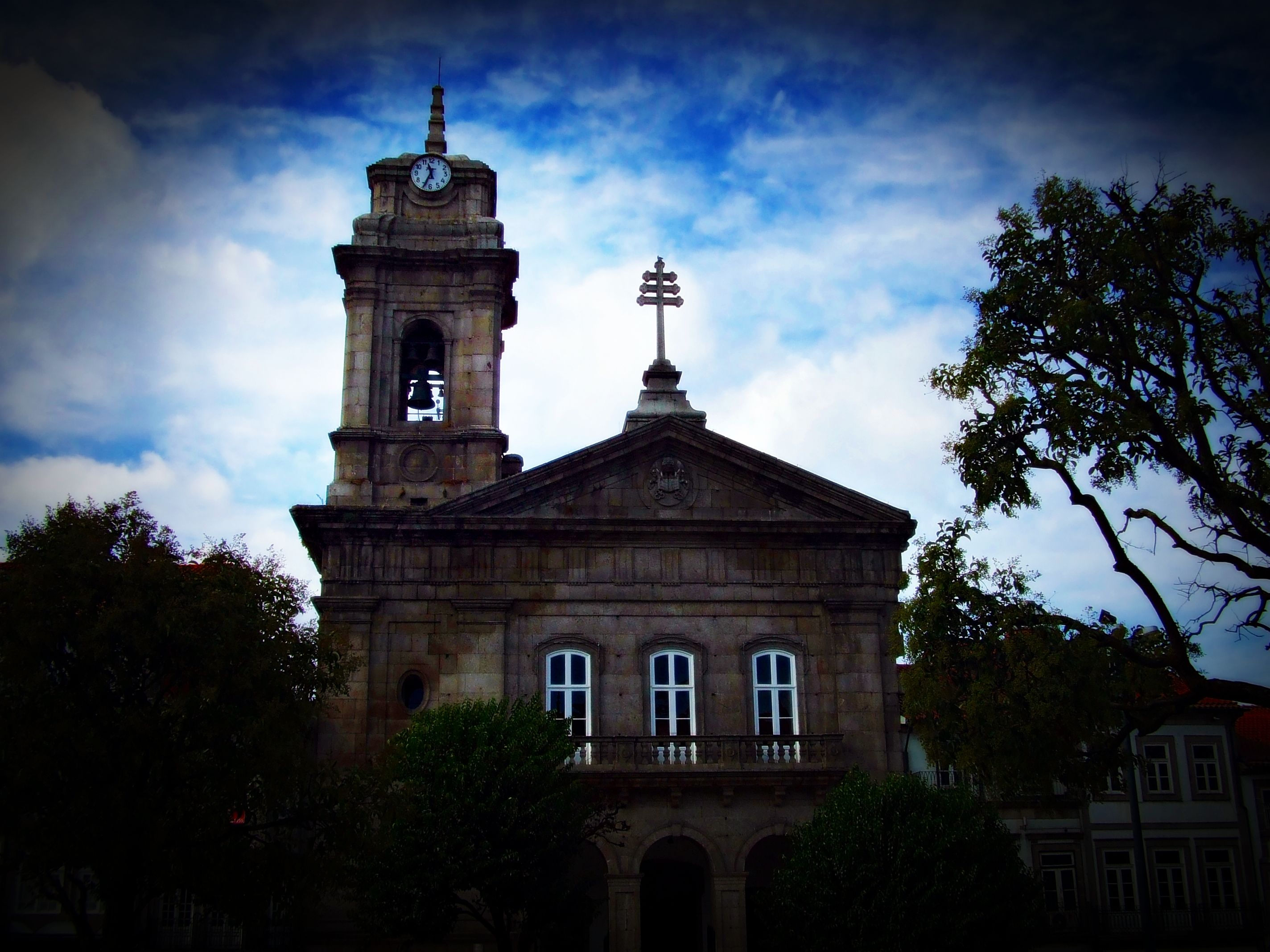 Basílica de São Pedro, perto do Centro Histórico de Guimarães. This file was uploaded for Wiki Loves Monuments in Portugal with the unique identifier 97030080.